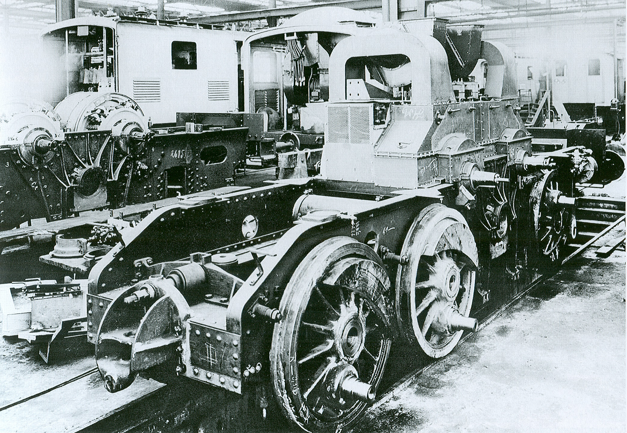 Werkfoto der AEG von einem Triebdrehgestelll der E 91